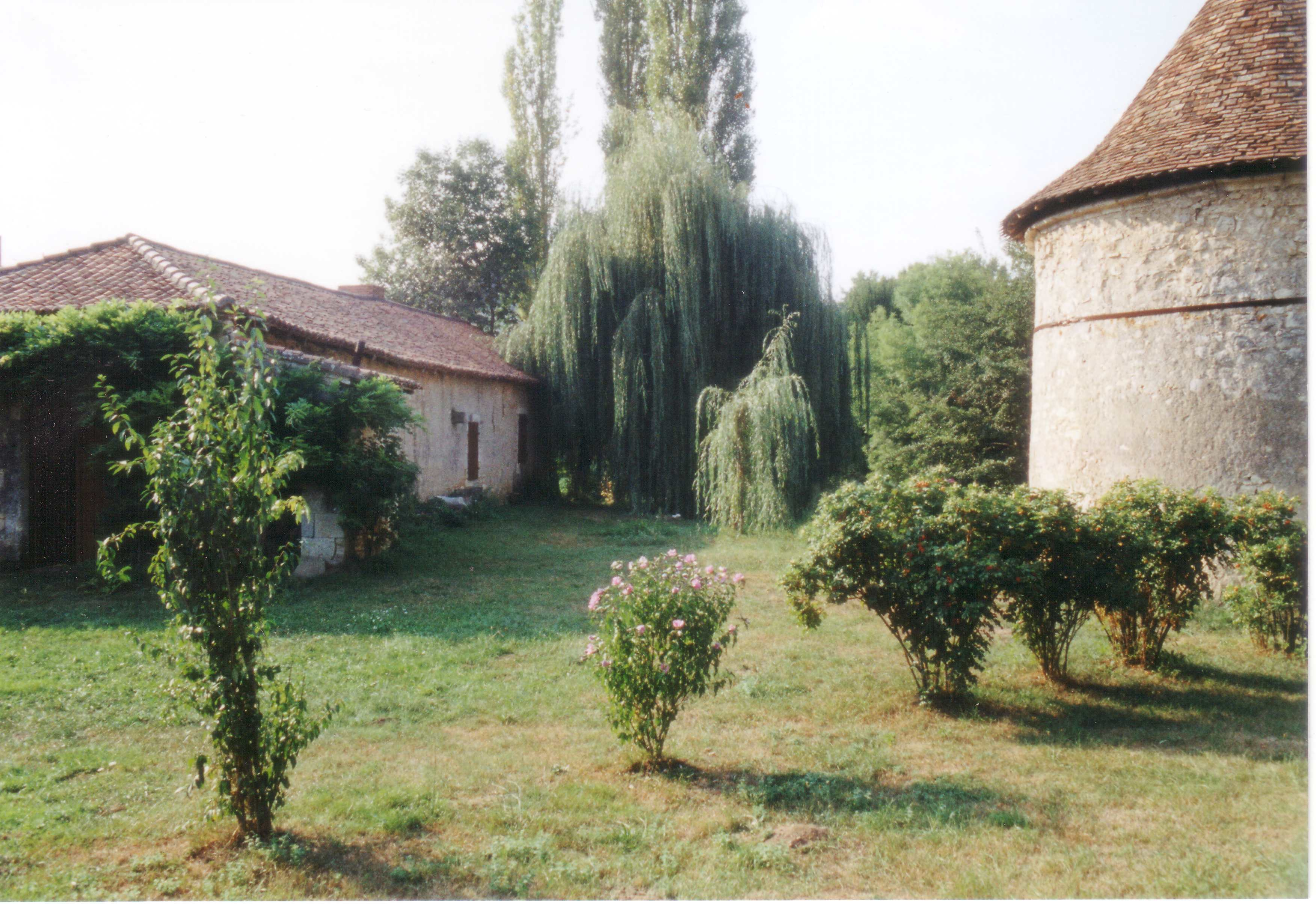 La petite rivière Bandiat qui prend sa source en Haute-Vienne, traverse le nord du département de la Dordogne, pour se perdre en Charente; en Dordogne au niveau du village Javerlhac. Bord du Bandiat en été 1998. (à comparer avec la photo image:Bandiat inondation.JPG